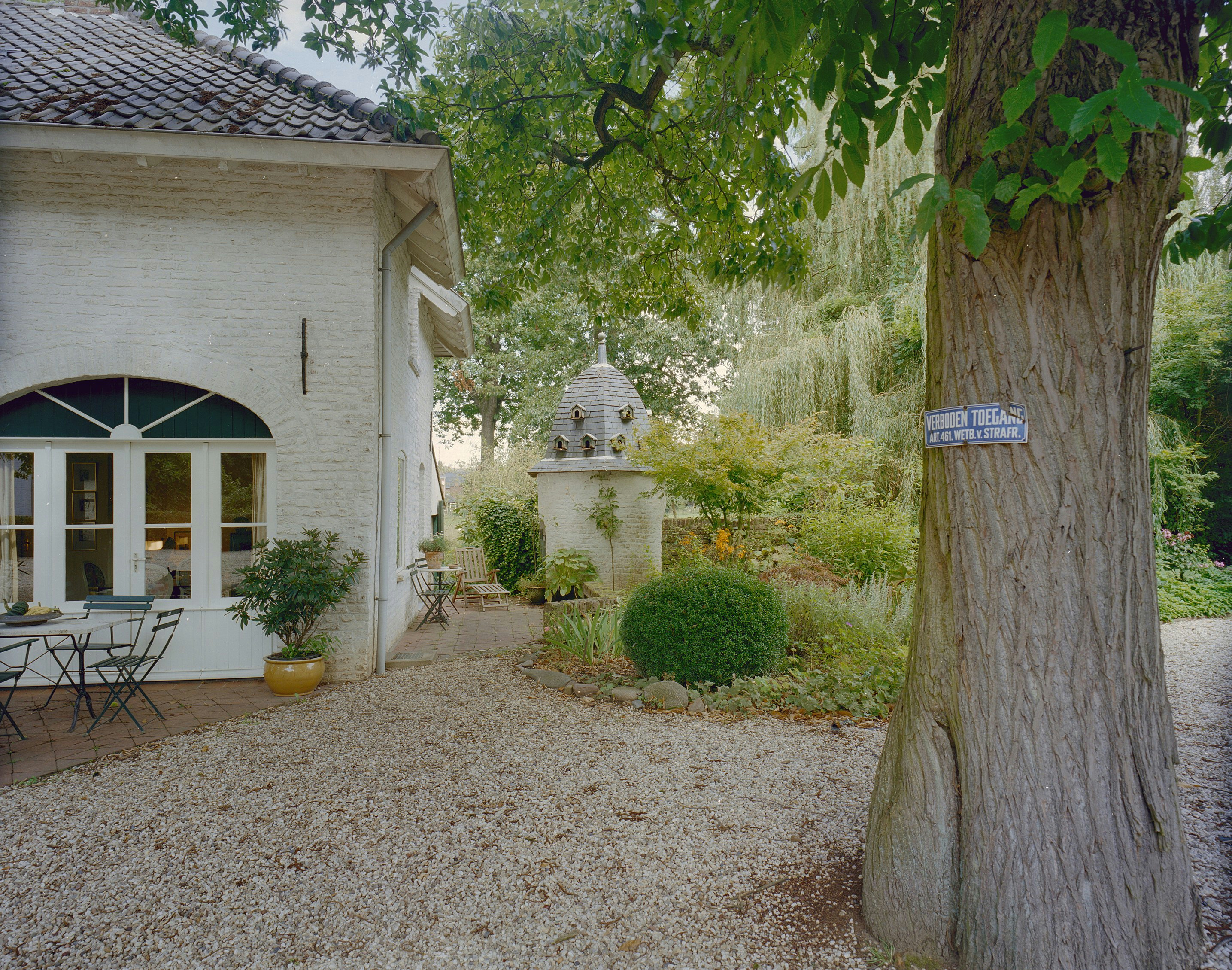 Kasteel Nieuwenbroeck: Duiventil (opmerking: Gefotografeerd voor Kastelen in Limburg (1000-1800), Burchten en landhuizen)